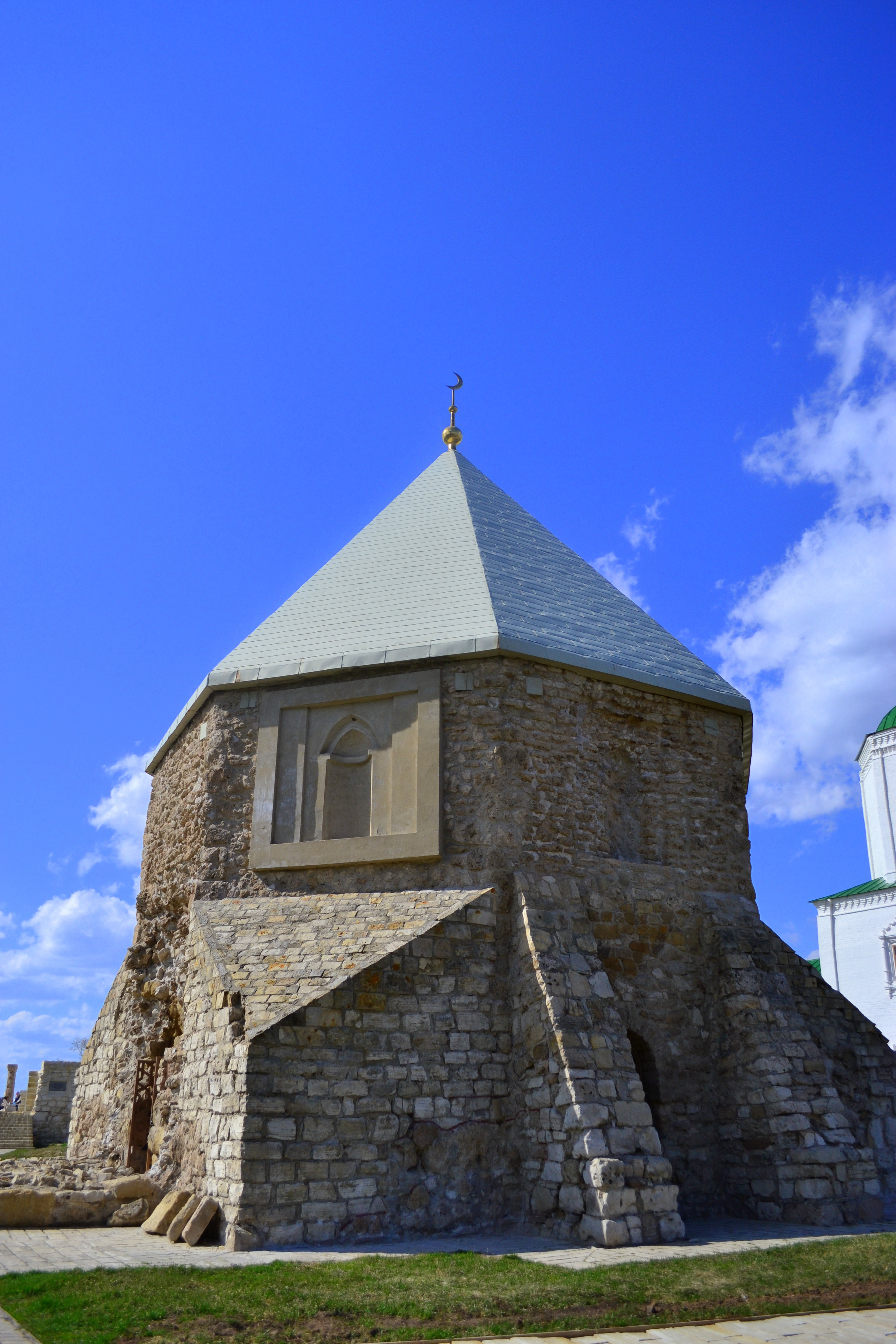 Комплекс памятников архитектуры XIII-XIV вв. на территории Булгарского городища (архитектурный комплекс «Болгары») (Республика Татарстан, Болгар, село Болгары, городище)